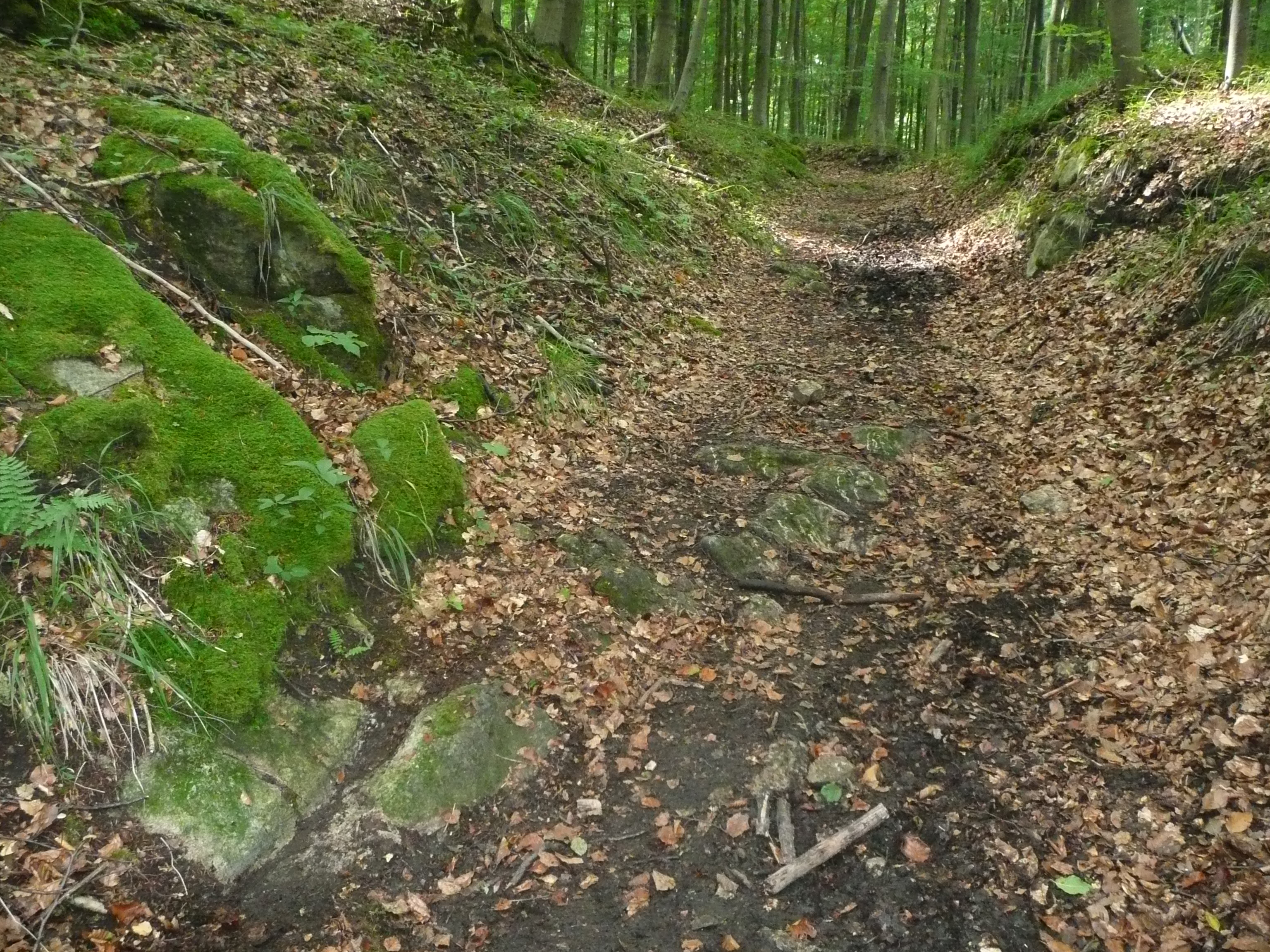 „Römerstraße“ im Hang des Urfttales bei Nettersheim, Kreis Euskirchen